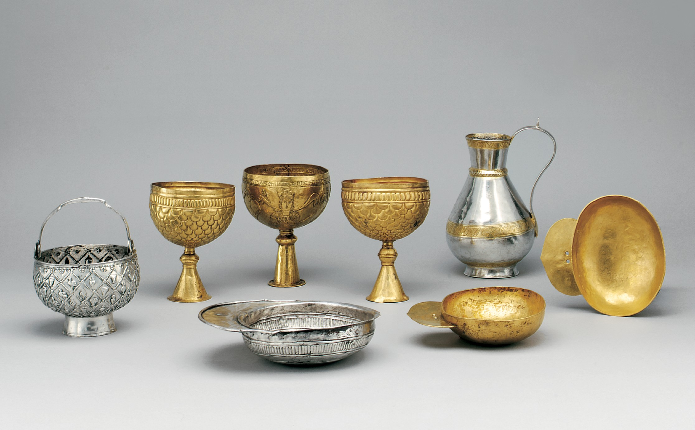 Byzantine; Bucket; Metalwork-Silver